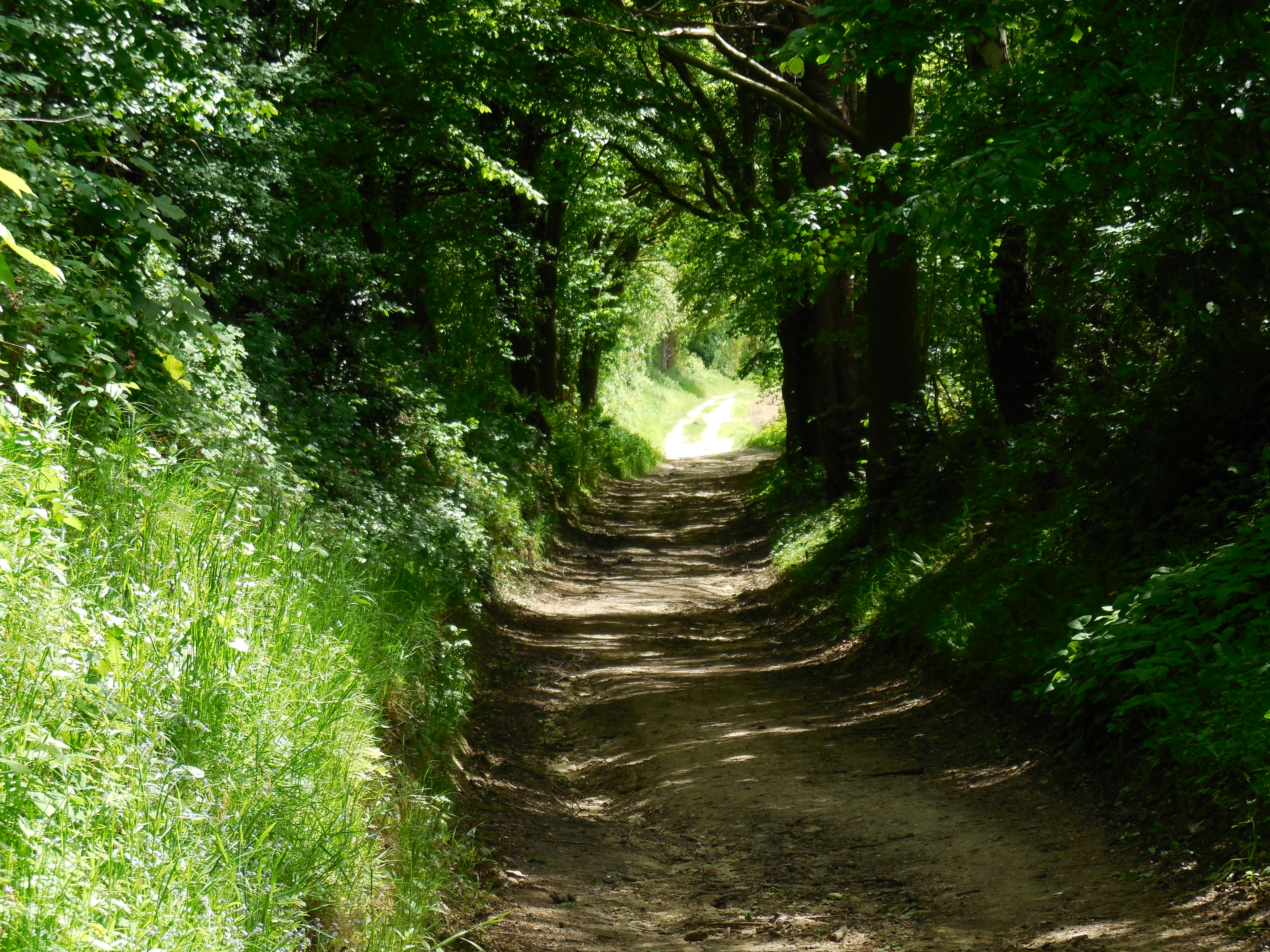 Voorbeeld van een mooie holle weg in Puth